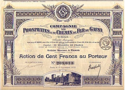 Compagnie des phosphates et des chemins de fer de Gafsa Action 100 Francs 1920